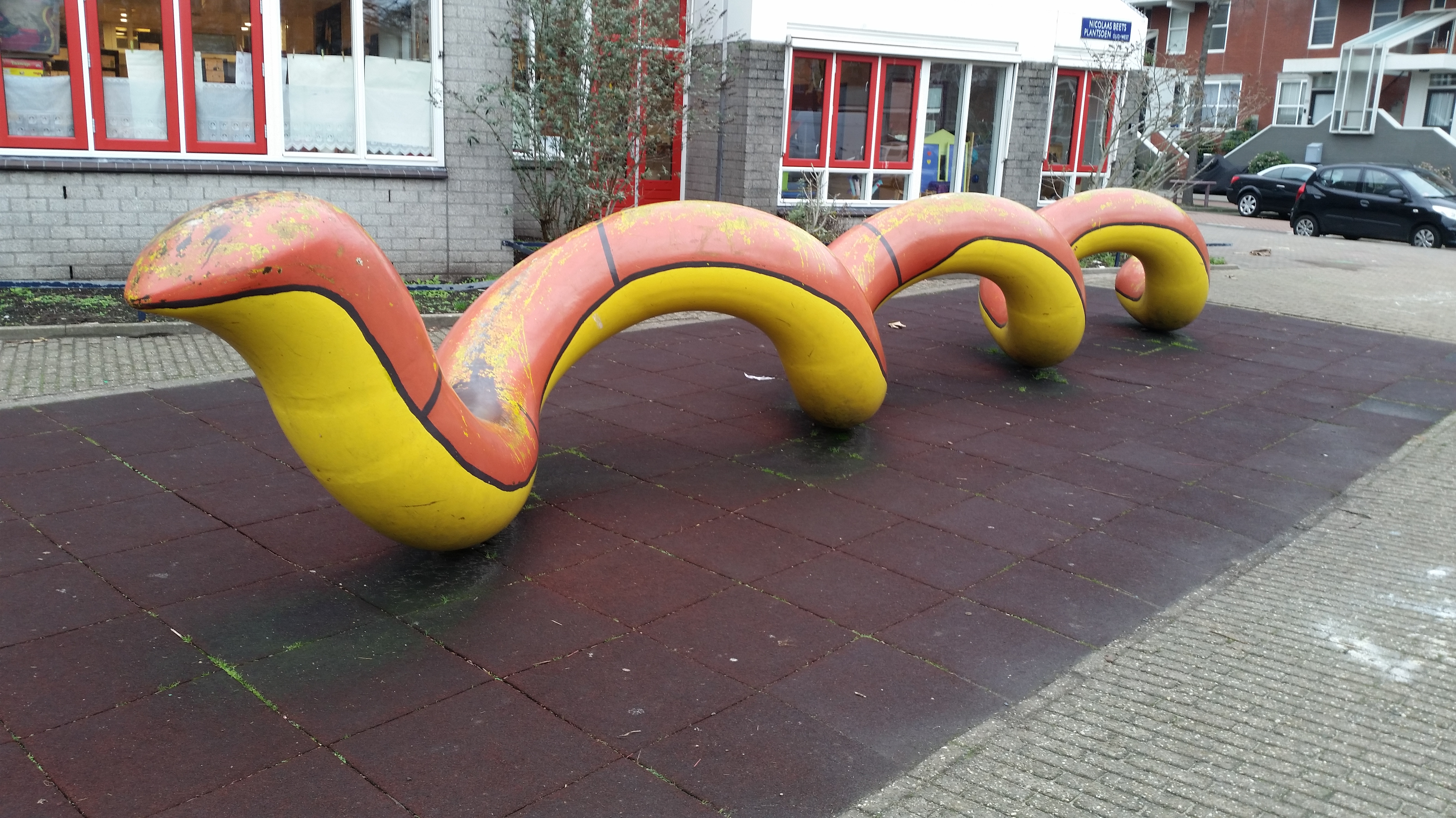 Nicolaas Beetsplantsoen, Amsterdam, slang als speelobject